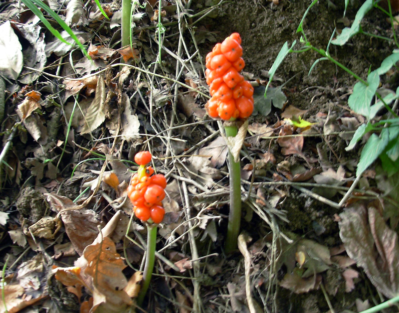 Аронник родственный (Arum consobrinum Schott ) - растение семейства аронниковых (Araceae). Встречается в субтропических лесах. (Масаллинский район, Азербайджан)